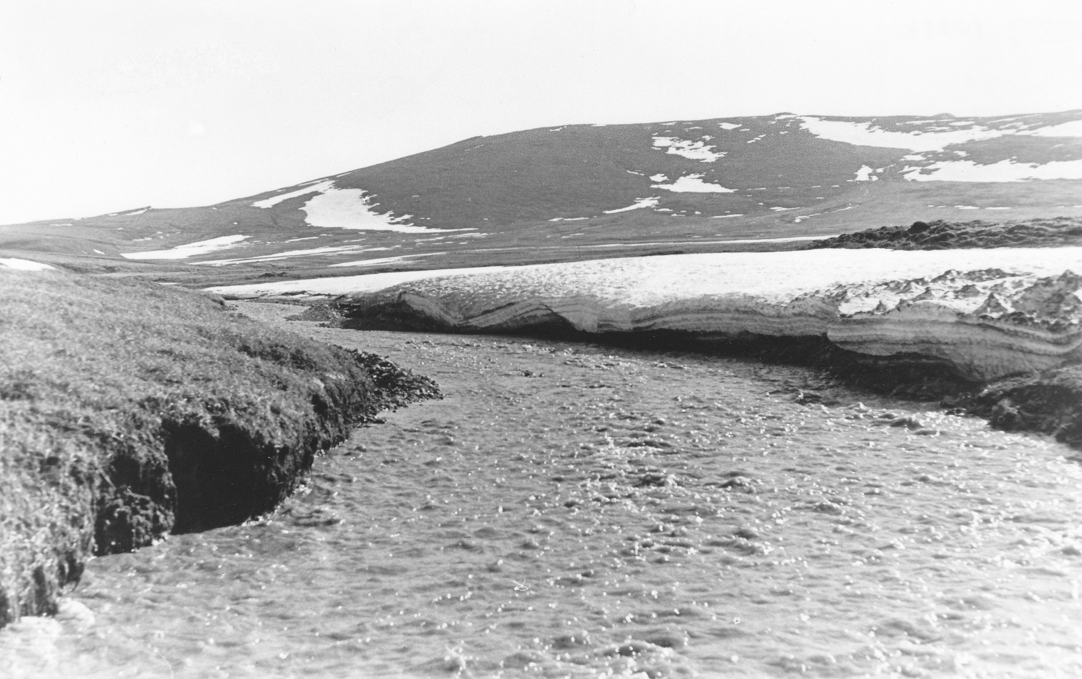 река Пильхинкууль в районе п. Полярный